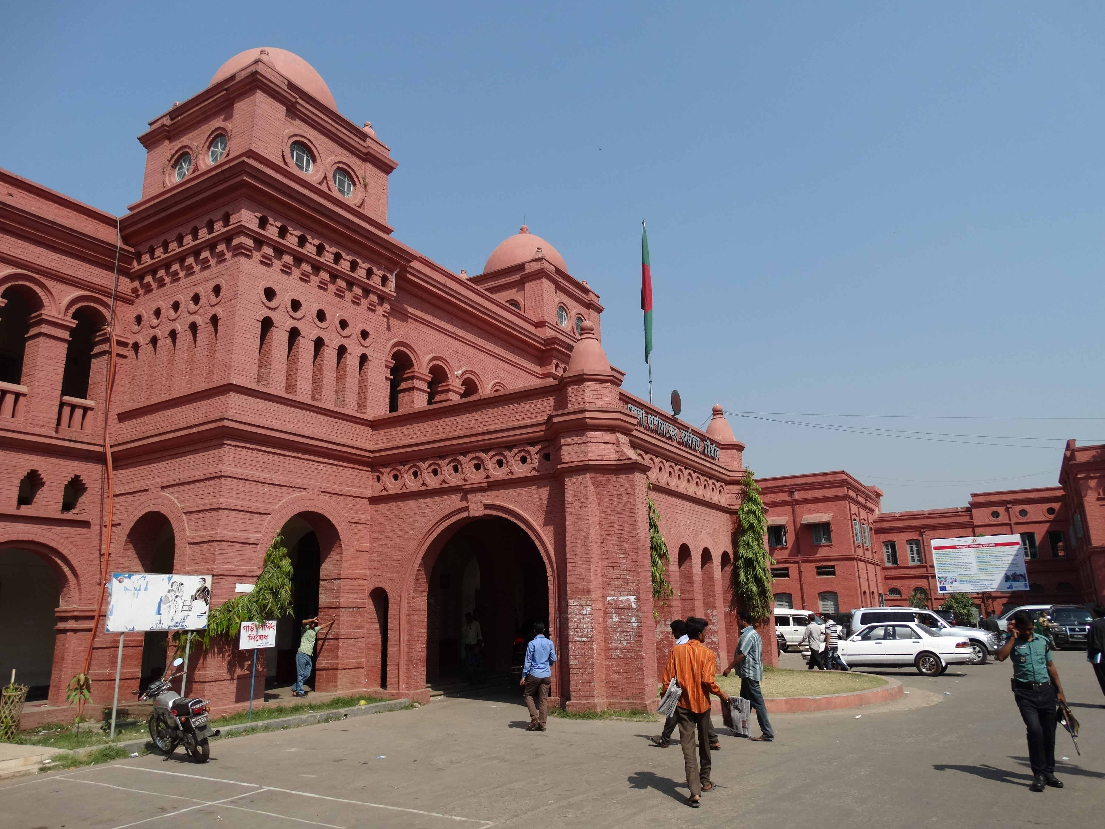 Colonial-Era Court Building - Chittagong - Bangladesh